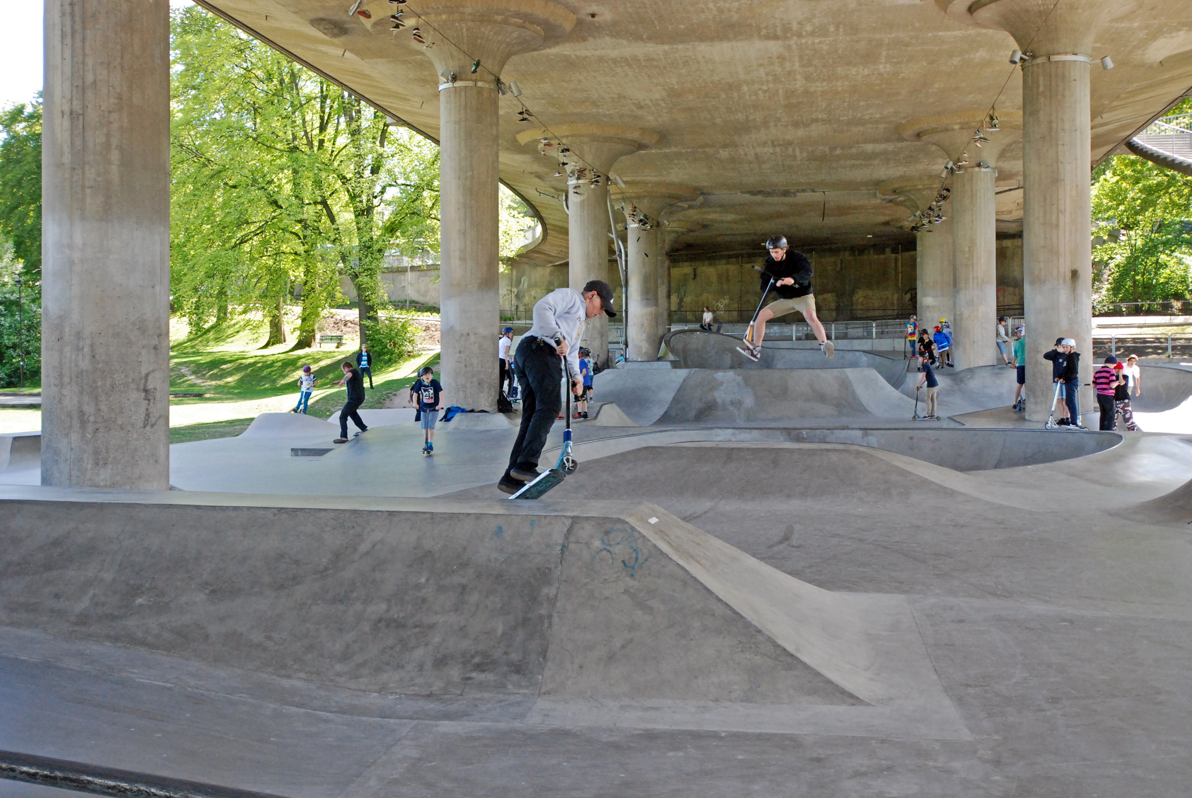 Skateparken i Rålambshovsparken, Stockholm